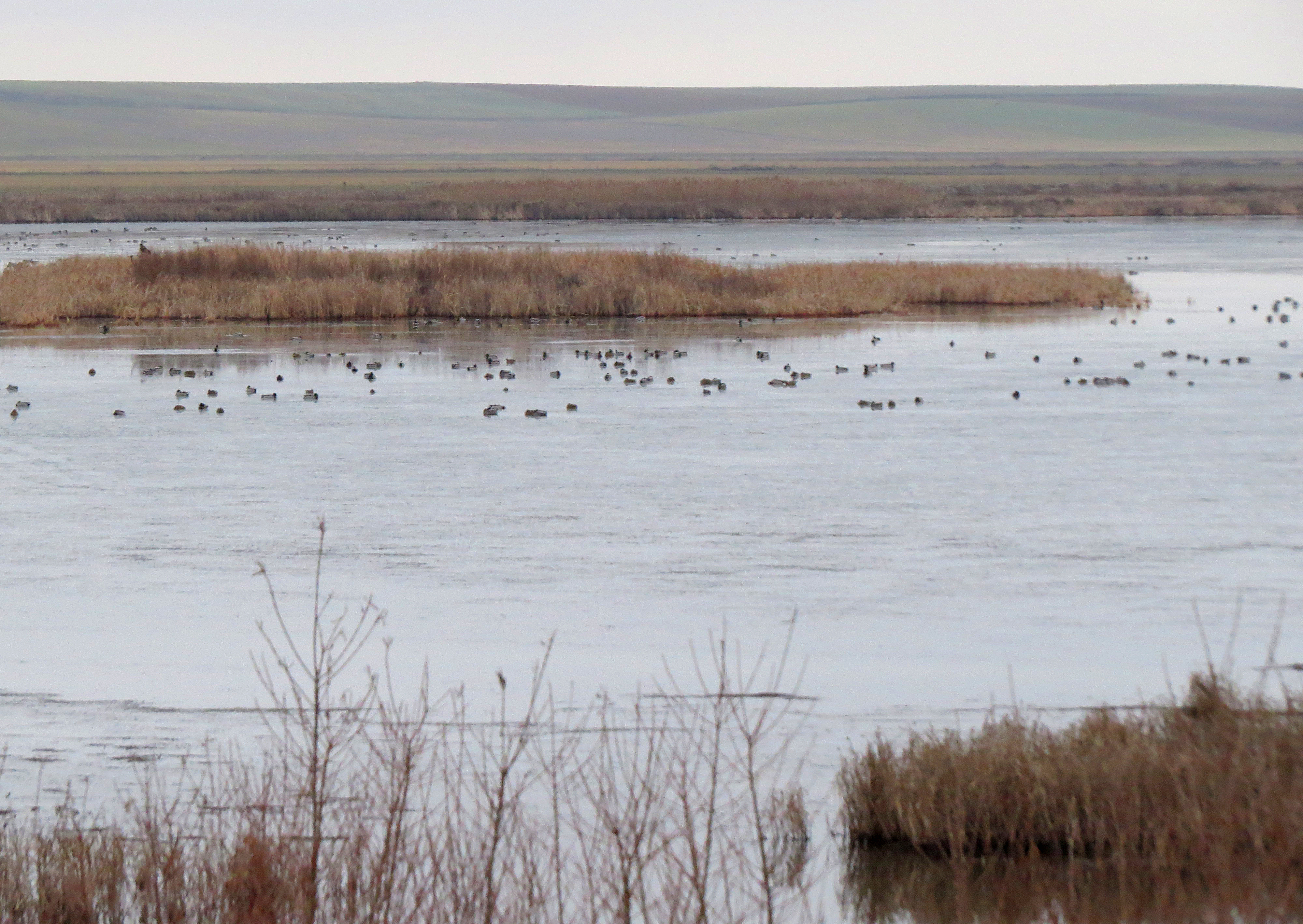 Laguna de la Nava This is a photography of a Site of Community Importance in Spain with the ID: ES4140136. Natura2000 entry, EEA entry